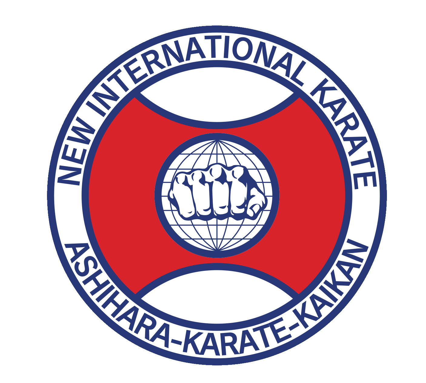 New International Karate Organization Ashihara-Karate Kaikan